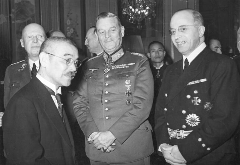 Scherl Bilderdienst: Empfang zu Ehren Matsuokas in der japanischen Botschaft. Am Freitag abend [28.3.41] veranstaltete der japanische Botschafter in Berlin, Generalleutnant Oshima, einen Empfang zu Ehren des Abgesandten des Tenno, Aussenminister Matsuoka. Unsere Aufnahme zeigt Exzellenz Matsuoka im Gespräch mit Generalfeldmarschall Keitel und Botschafter Stahmer. 29.3.41 ADN-ZB-Archiv Der Besuch des japanischen Aussenministers Yosuke Matsuoka in Berlin vom 26. bis 30.3.1941 Der japanische Botschafter in Berlin, Generalleutnant Oshima, gab am 29.3. zu Ehren des Gastes einen Empfang in der japanischen Botschaft. UBz.: Aussenminister Matsuoka im Gespräch mit Generalfeldmarschall Wilhelm Keitel und dem deutschen Botschafter in Tokio, Heinrich Georg Stahmer. Ganz links Reichsminister Dr. Heinrich Lammers. 3339-41